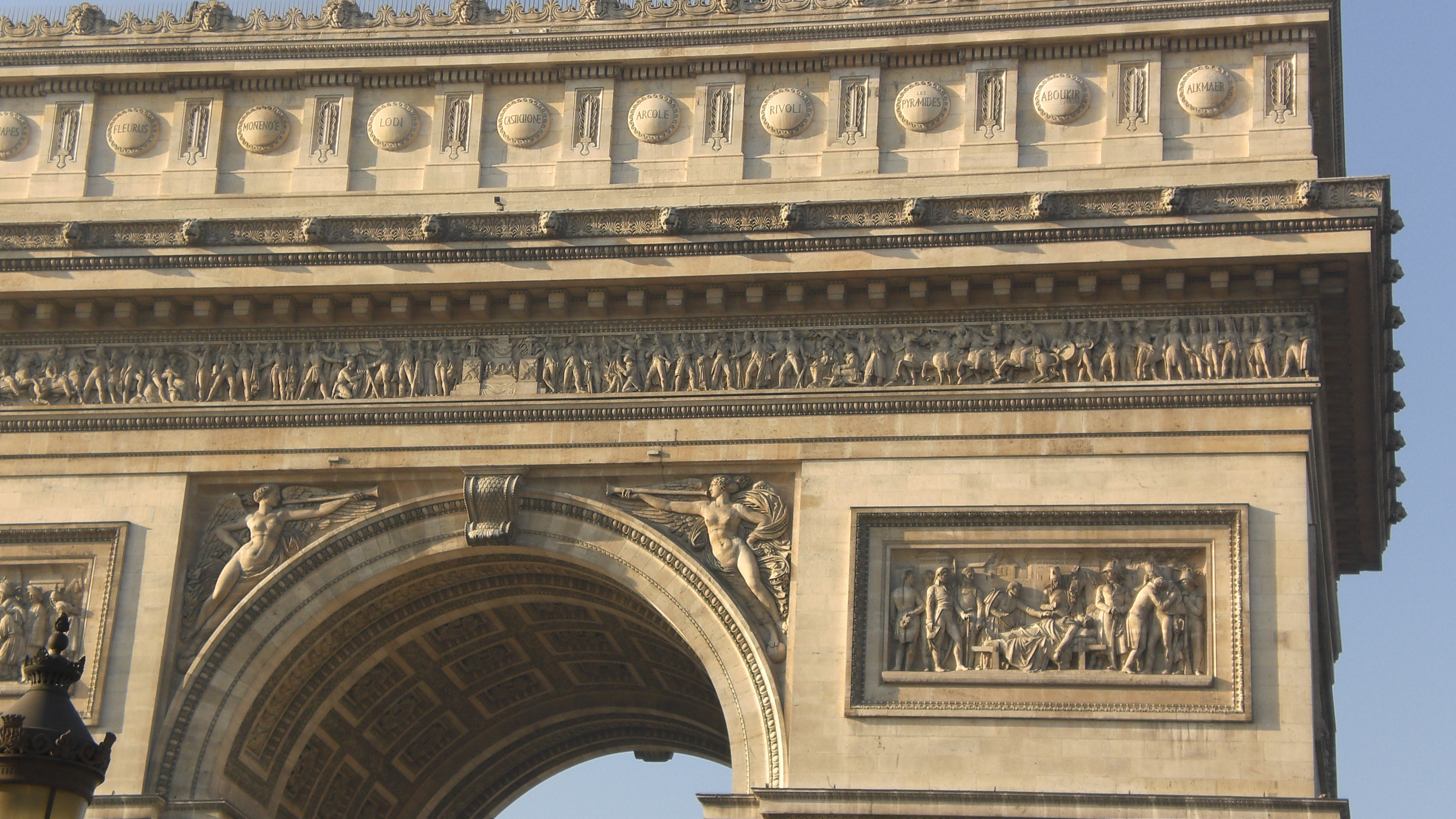 中文（台灣）: 巴黎凱旋門(Arc de Triomphe)的頂部特寫。2007年12月20日旅遊巴黎時自行拍攝。